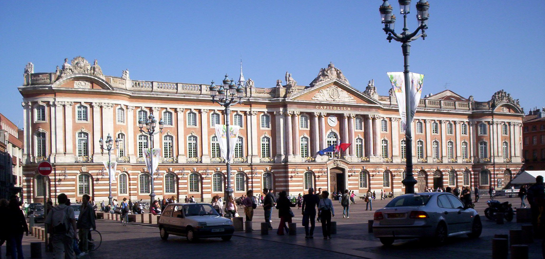 place du capitole A TOULOUSE par tonio94